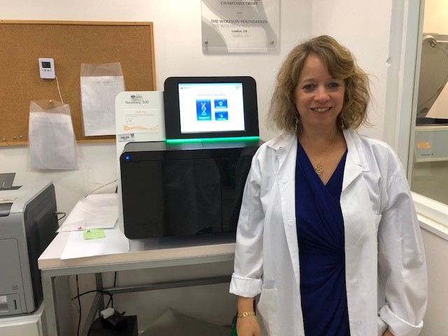 ד"ר חגית בריס-פלדמן ליד המכשיר לריצוף מהדור הבא(Illumina)